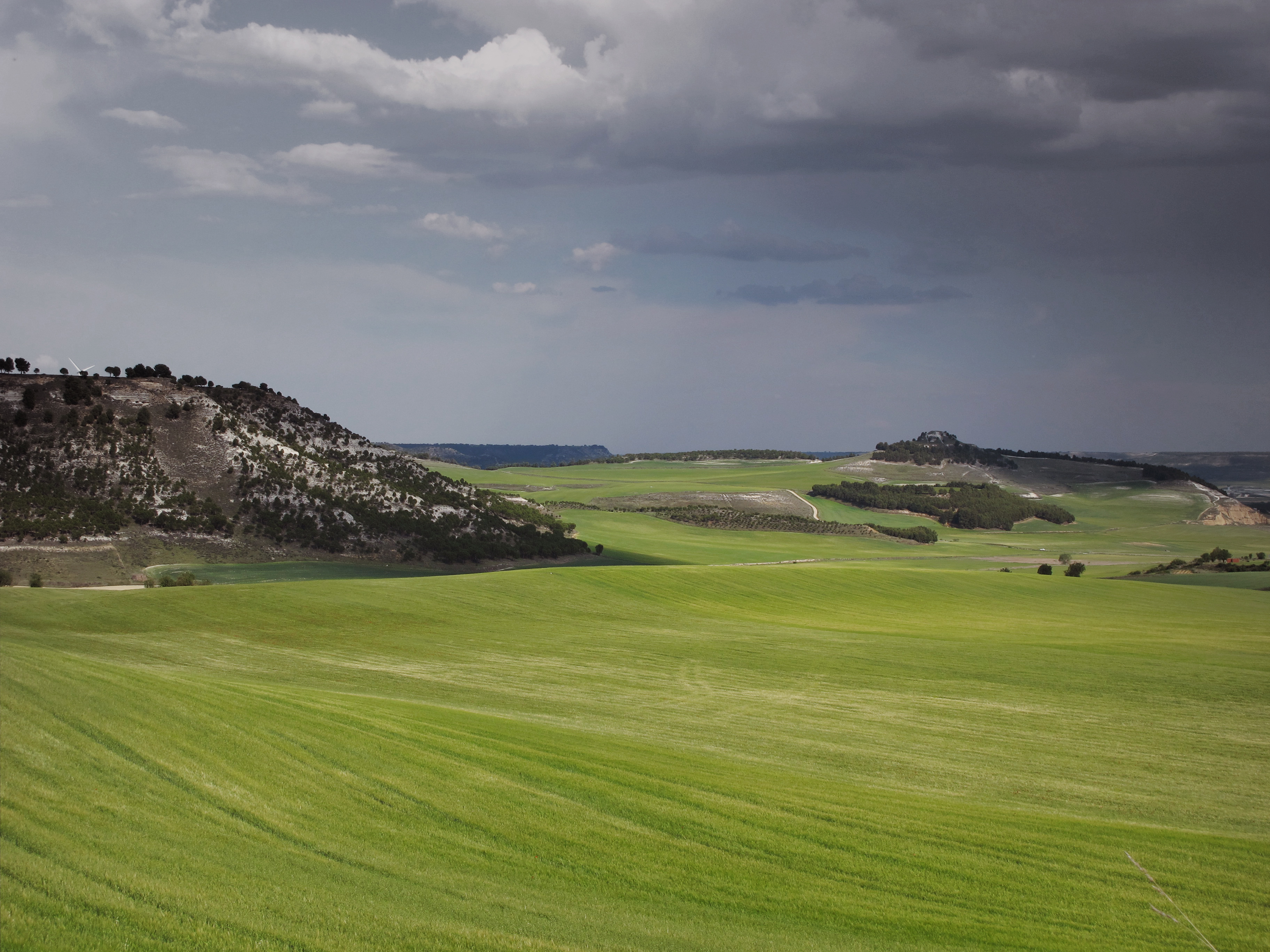 Comarca de El Cerrato Palentino, provincia de Palencia, España.